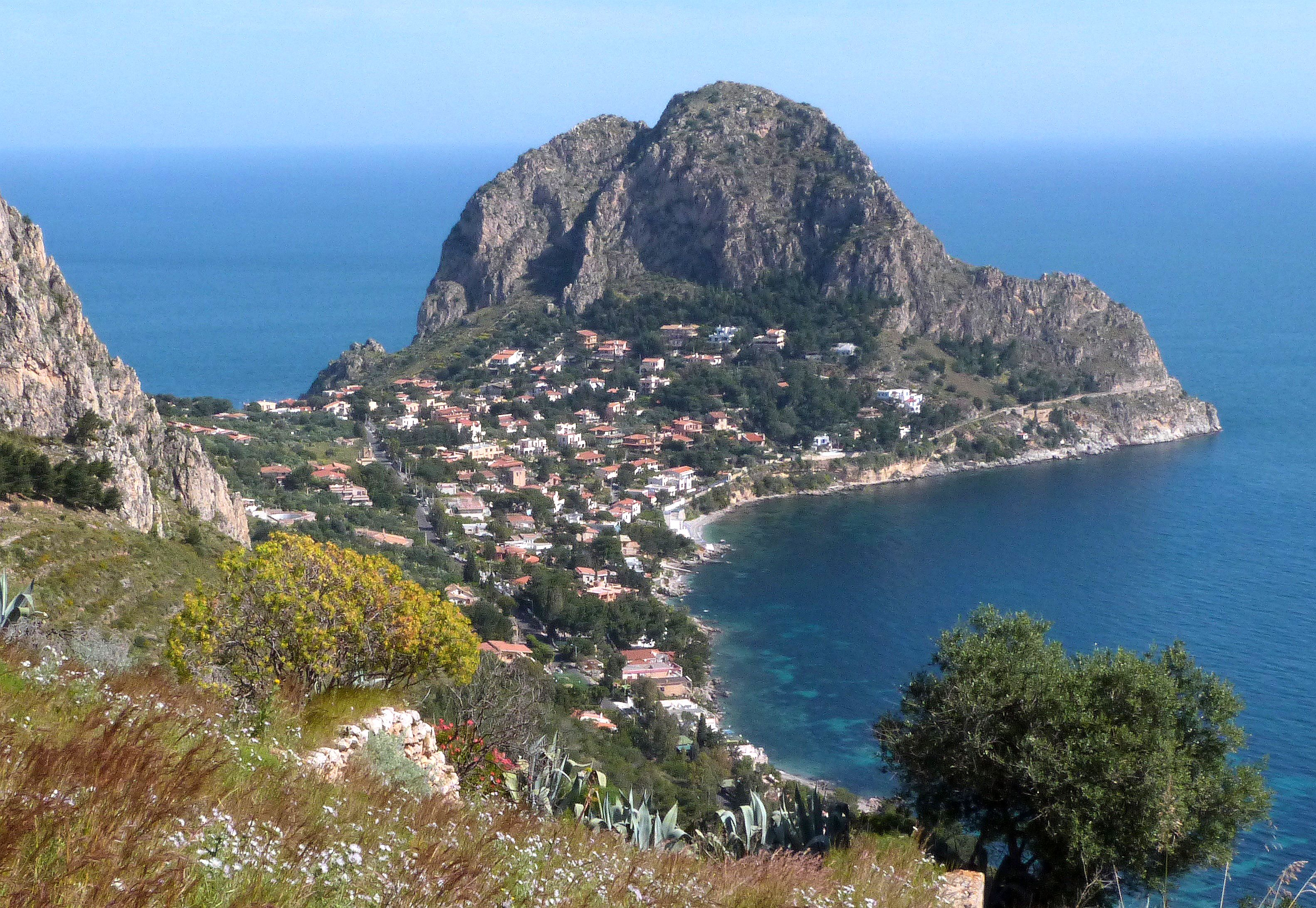 Solunt: Blick auf Zafferano